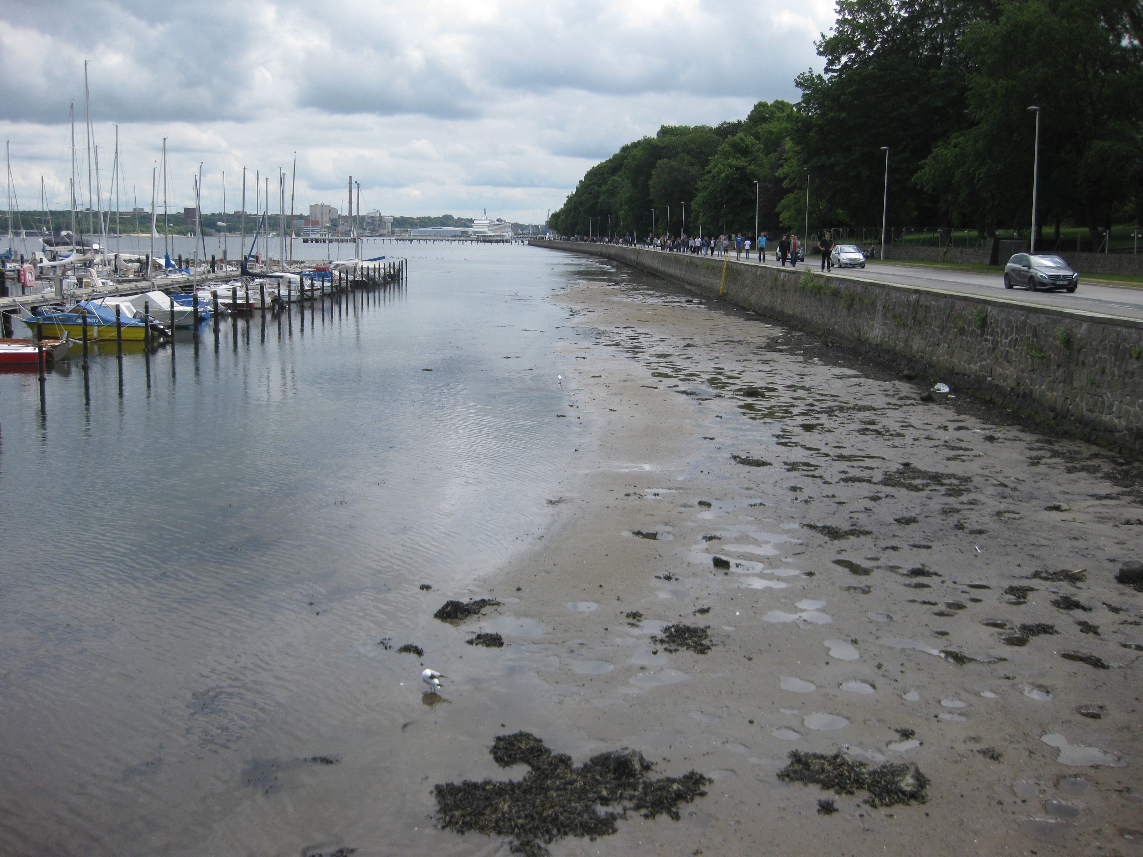 Hindenburgufer (Kiellinie) Kiel bei ablaufendem Wasser